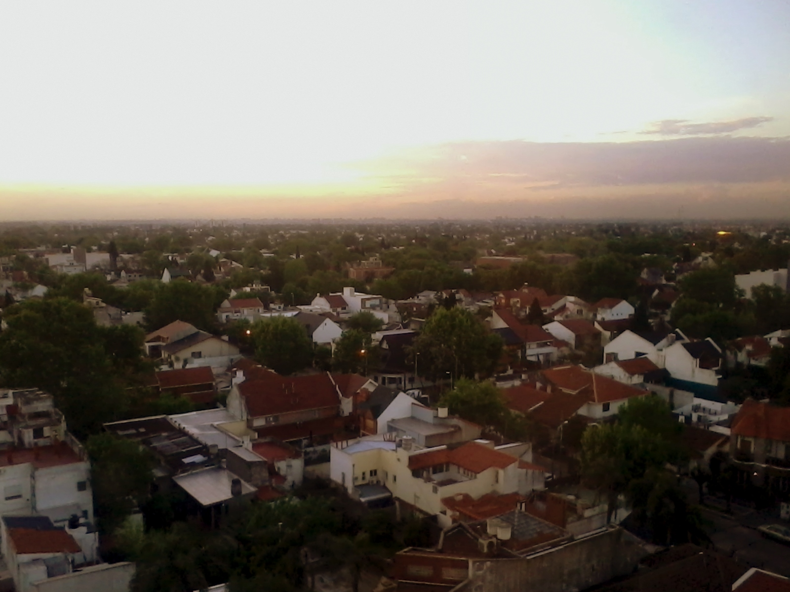 Vista de la ciudad de Lomas de Zamora.